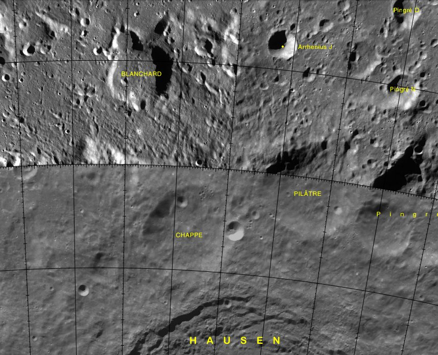 Cráter Chappe (LRO)